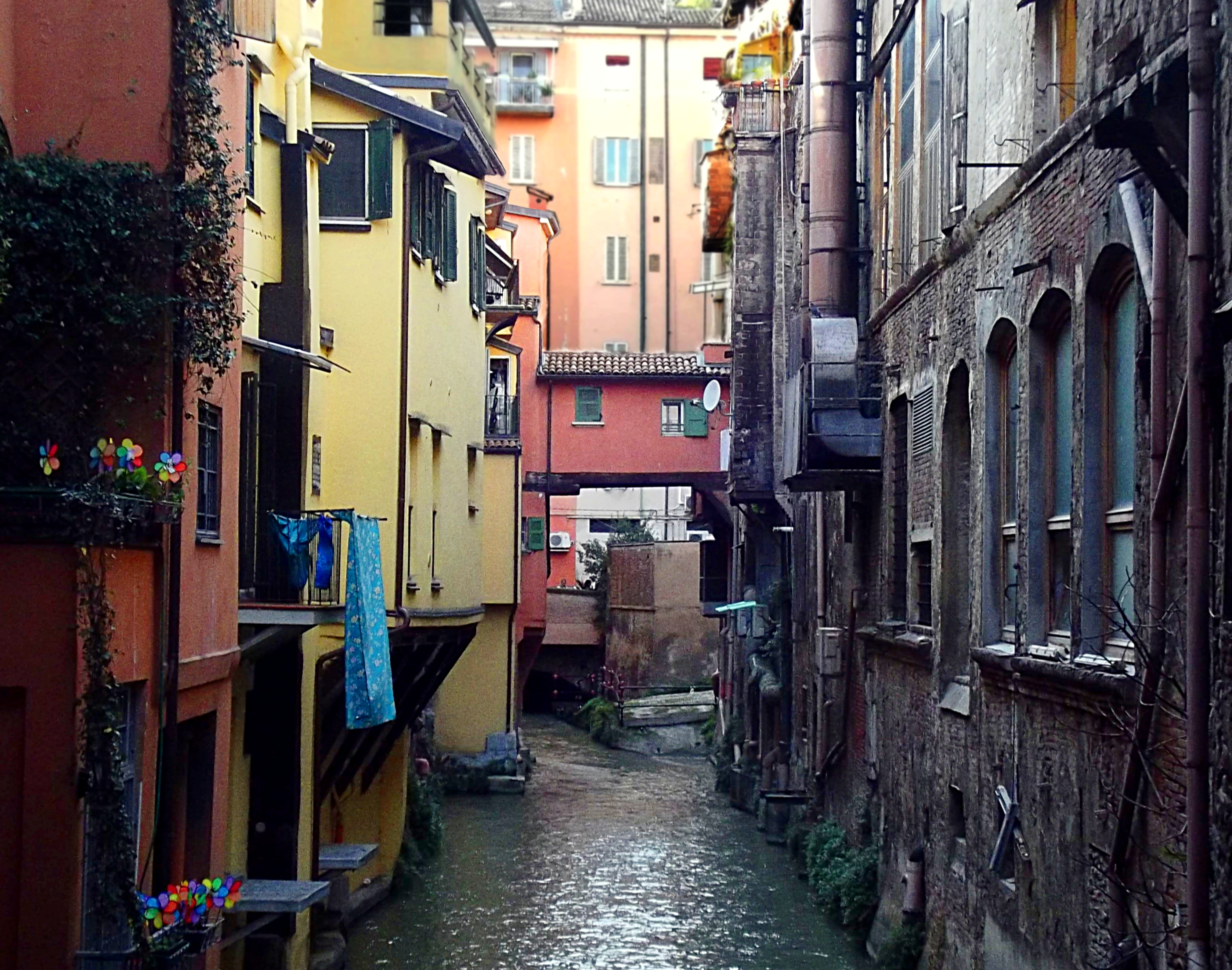 Canale delle Moline, Bologna,Italia. Il canale fu realizzato nel 1100 per portare acqua all' interno della città che ne era sprovvista. Questo è uno dei pochi tratti in cui il canale è visibile (attraverso la "finestrella di via Piella" in zona Universitaria), perchè il suo percorso è, in gran parte, rinchiuso fra le case.